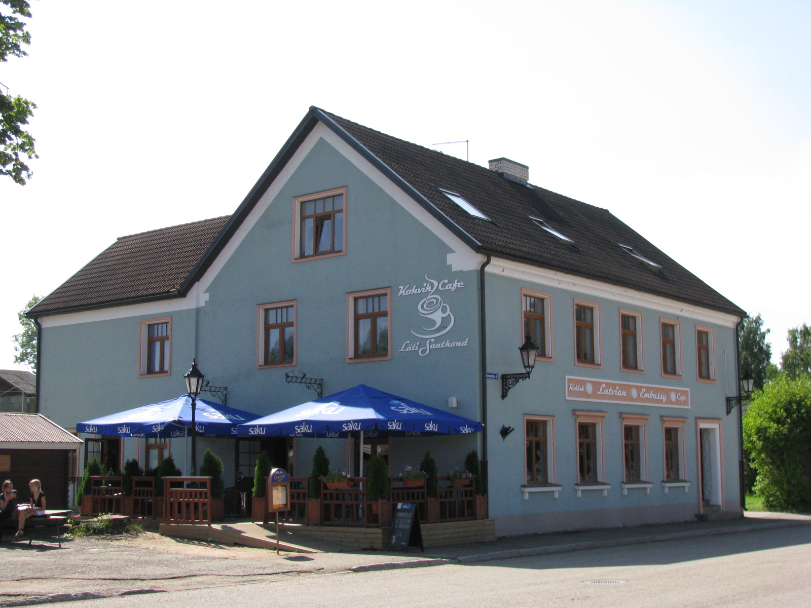 Kevade tn 4